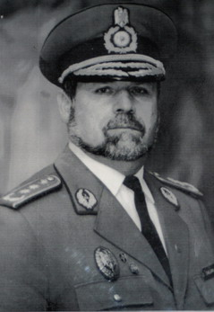 Generalul Mircea Chelaru.